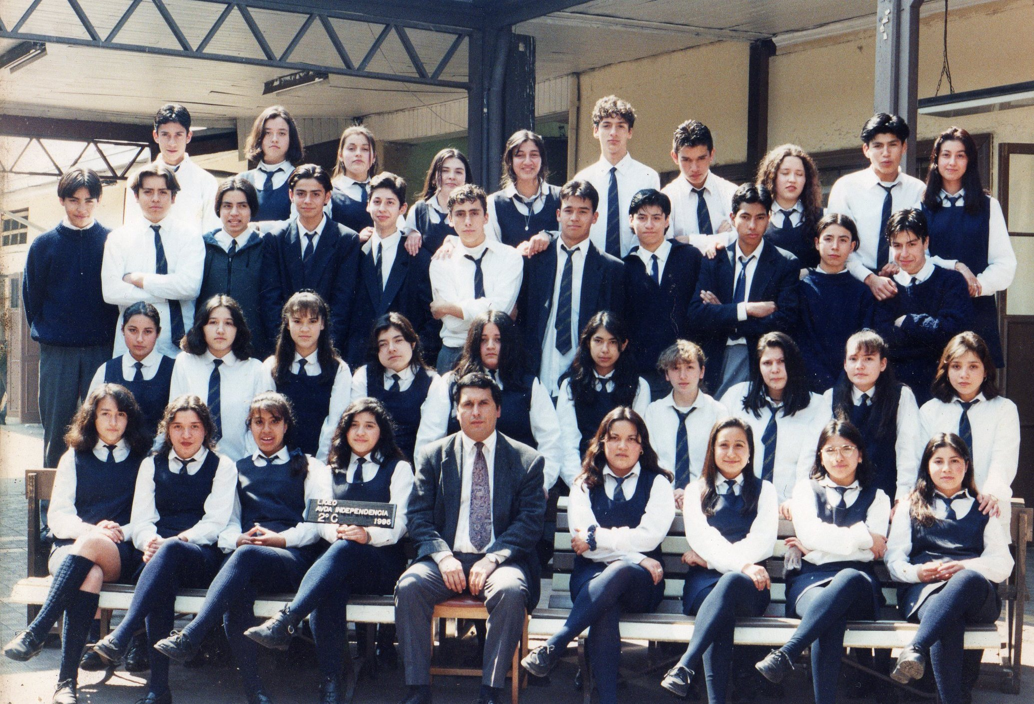 Liceo Diurno Avenida Independencia, Chile.